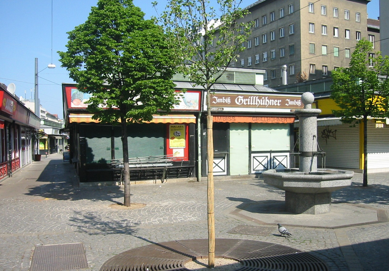 Wien Rochusmarkt